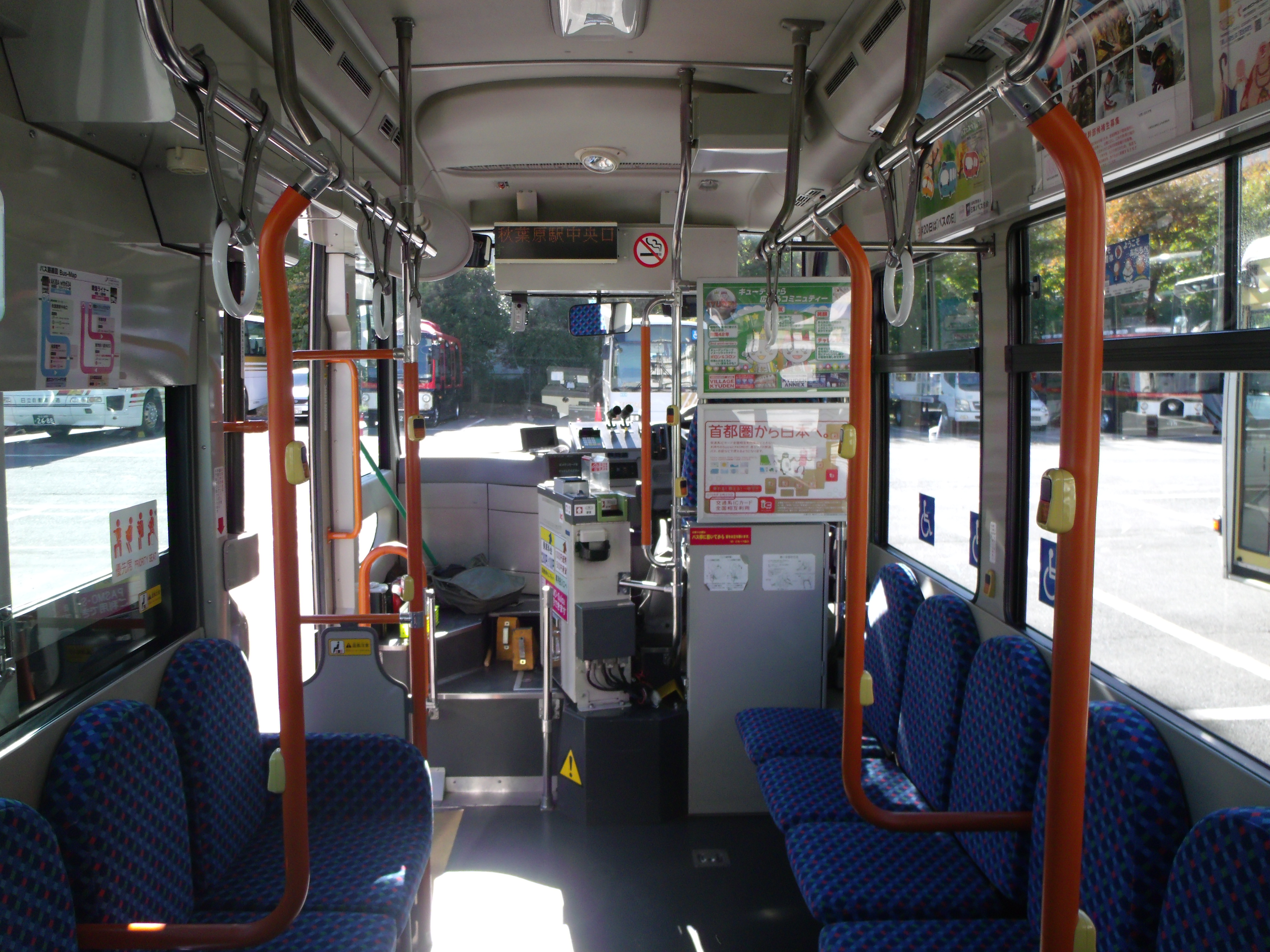 2代目ポンチョ（ショート）の車内（日立自動車交通）